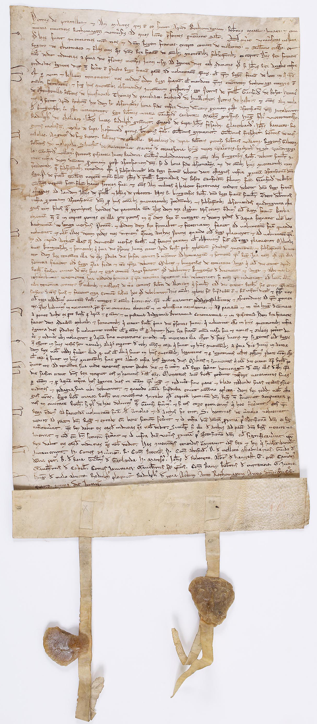 Capitulation de Rouen du 1er juin 1204. Pierre de Préaux et d'autres chevaliers normands, ainsi que le maire, les jurés et la commune de Rouen, concluent un accord avec le roi de France, qui prévoit la reddition de Rouen au roi Philippe Auguste si au bout de trente jours Jean sans Terre, roi d'Angleterre, n'a pas conclu la paix avec ce dernier.